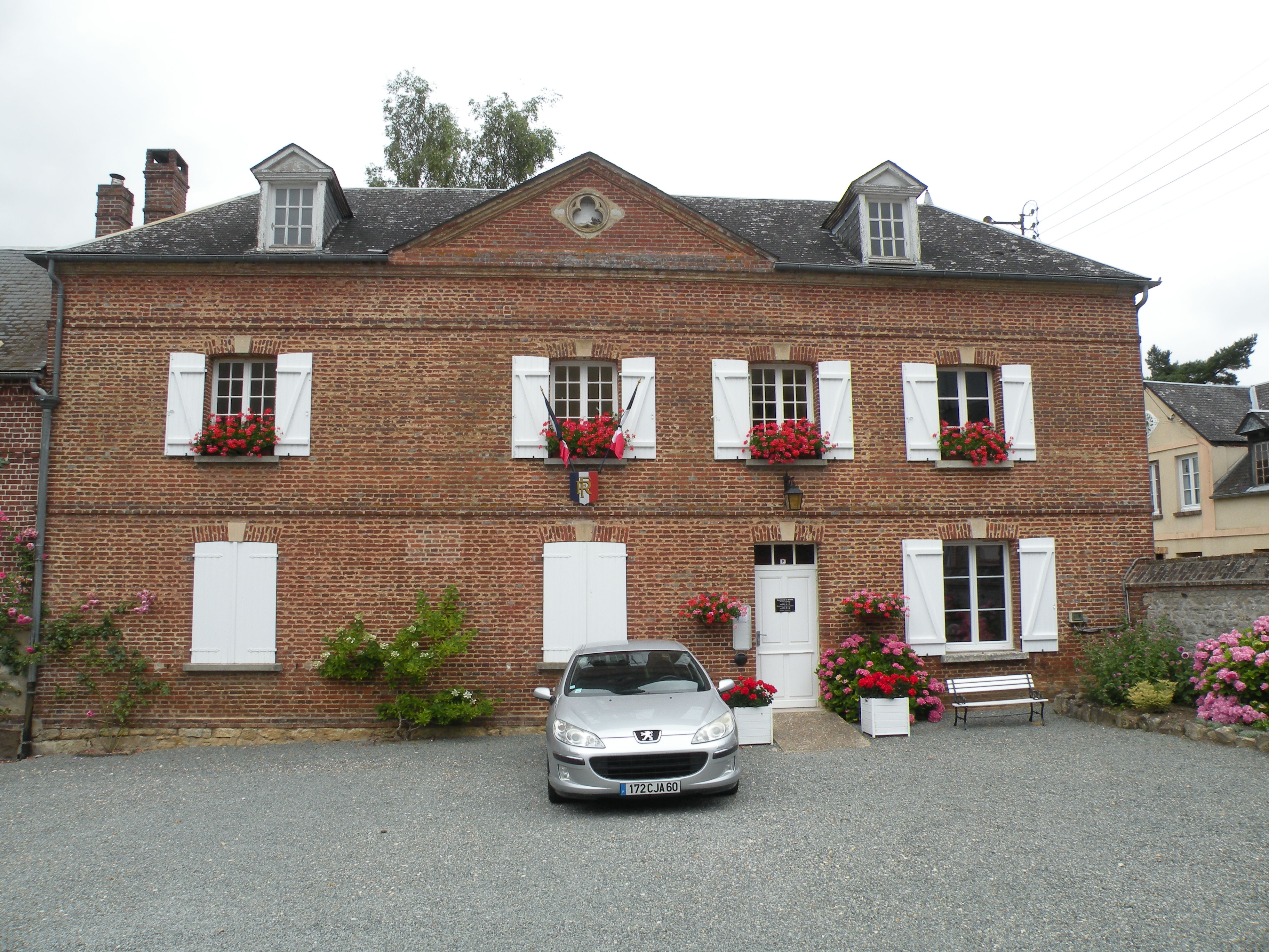 Hanvoile